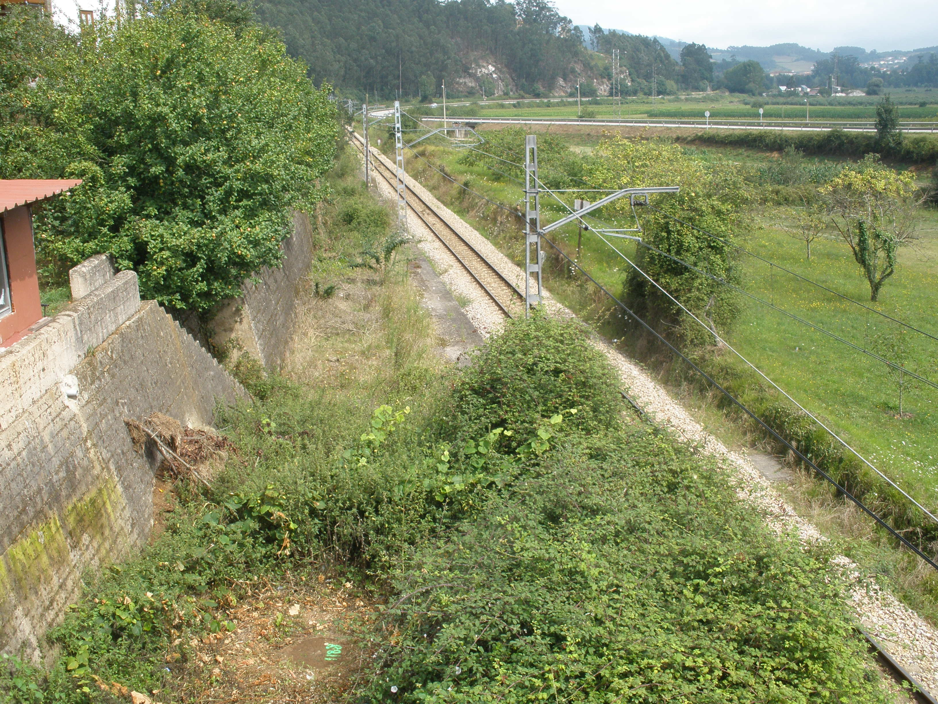 Punto de separación del ferrocarril Vasco Asturiano (en servicio) y el ferrocarril de Pravia a Villablino, en Forcinas (Pravia).